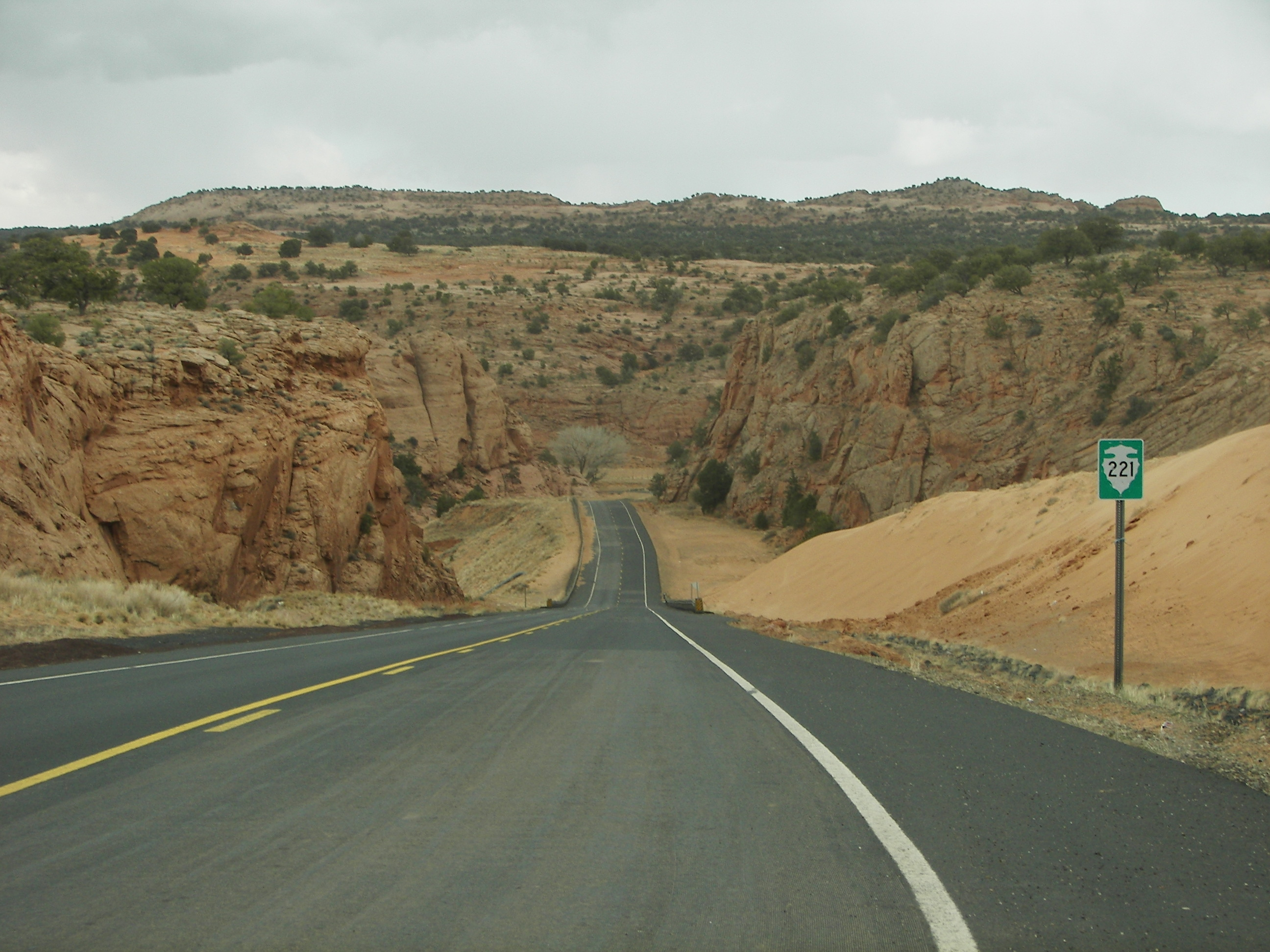 Diné bizaad: Shą́ą́tóhódi 'eekid, 2006 Tʼááłáhági átʼéego:Eʼelyaaígíí:Tłʼóoʼdi eelkid